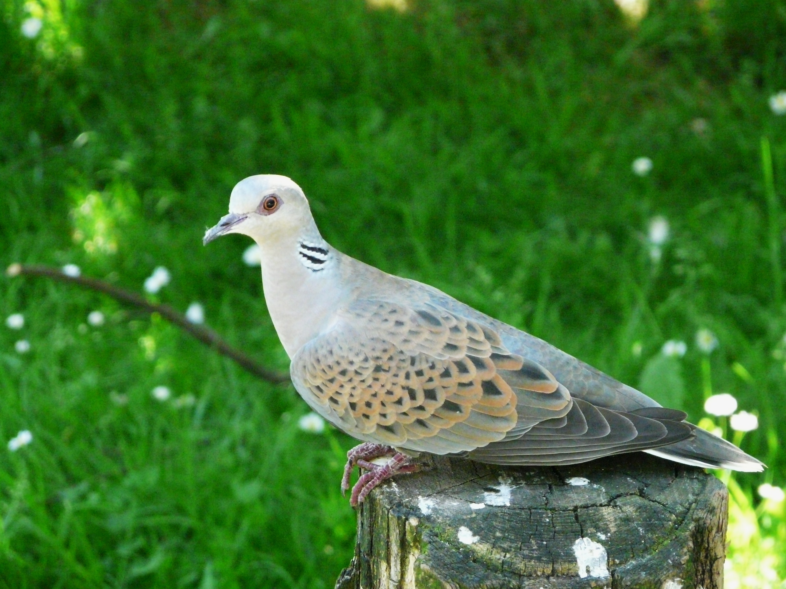 Tourterelle des bois (Streptopelia turtur), parc animalier des Pyrénées, Argelès-Gazost, Hautes-Pyrénées, France.